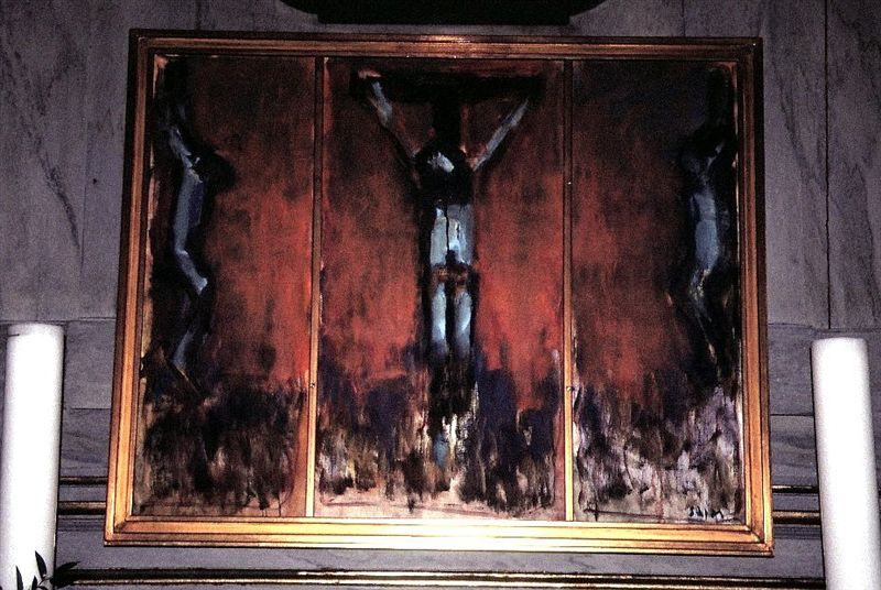 Damsholte Kirke i Danmark. Altertavlemaleri af Havsteen-Mikkelsen